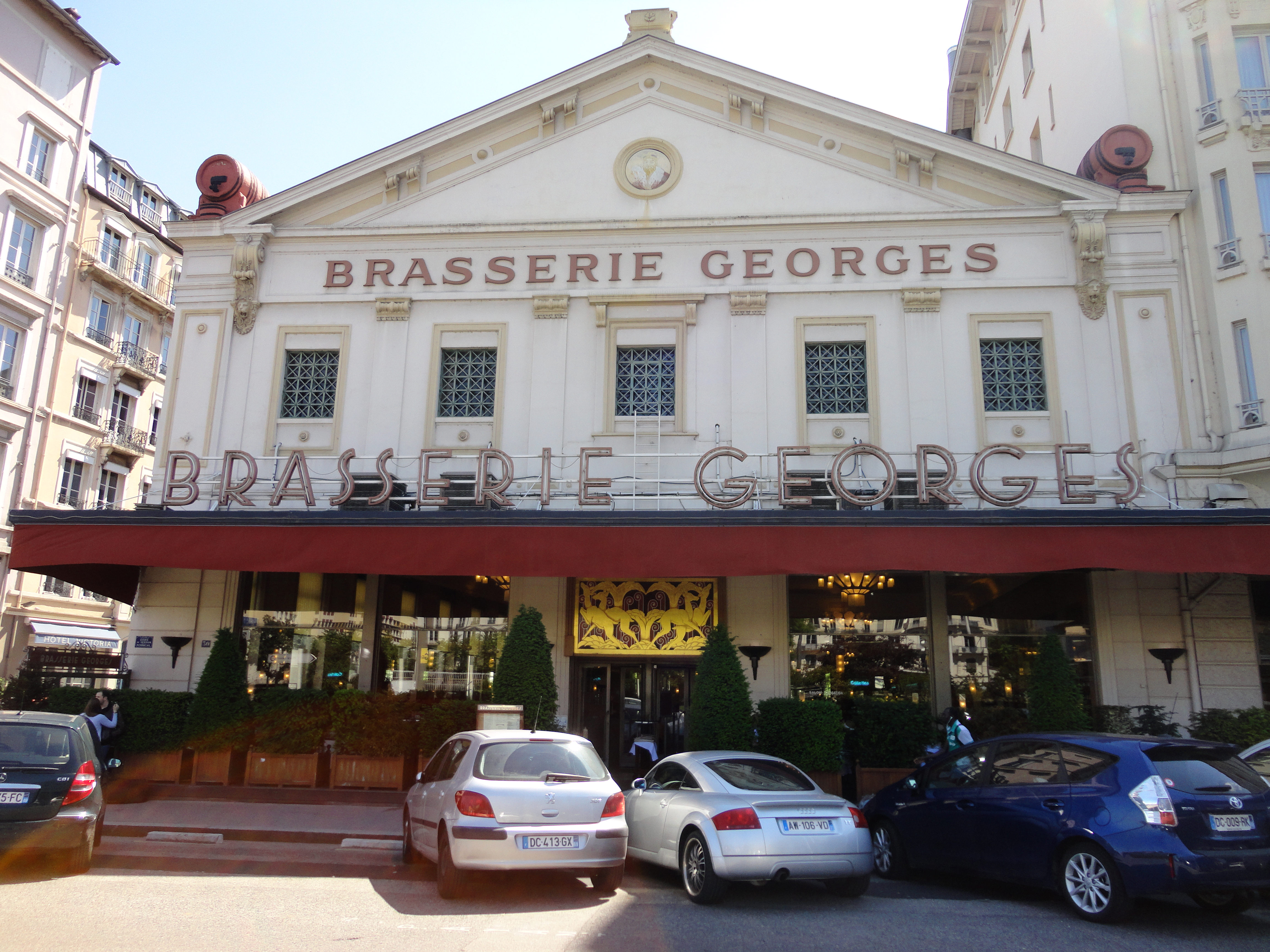 La Brasserie Georges à Lyon (France).